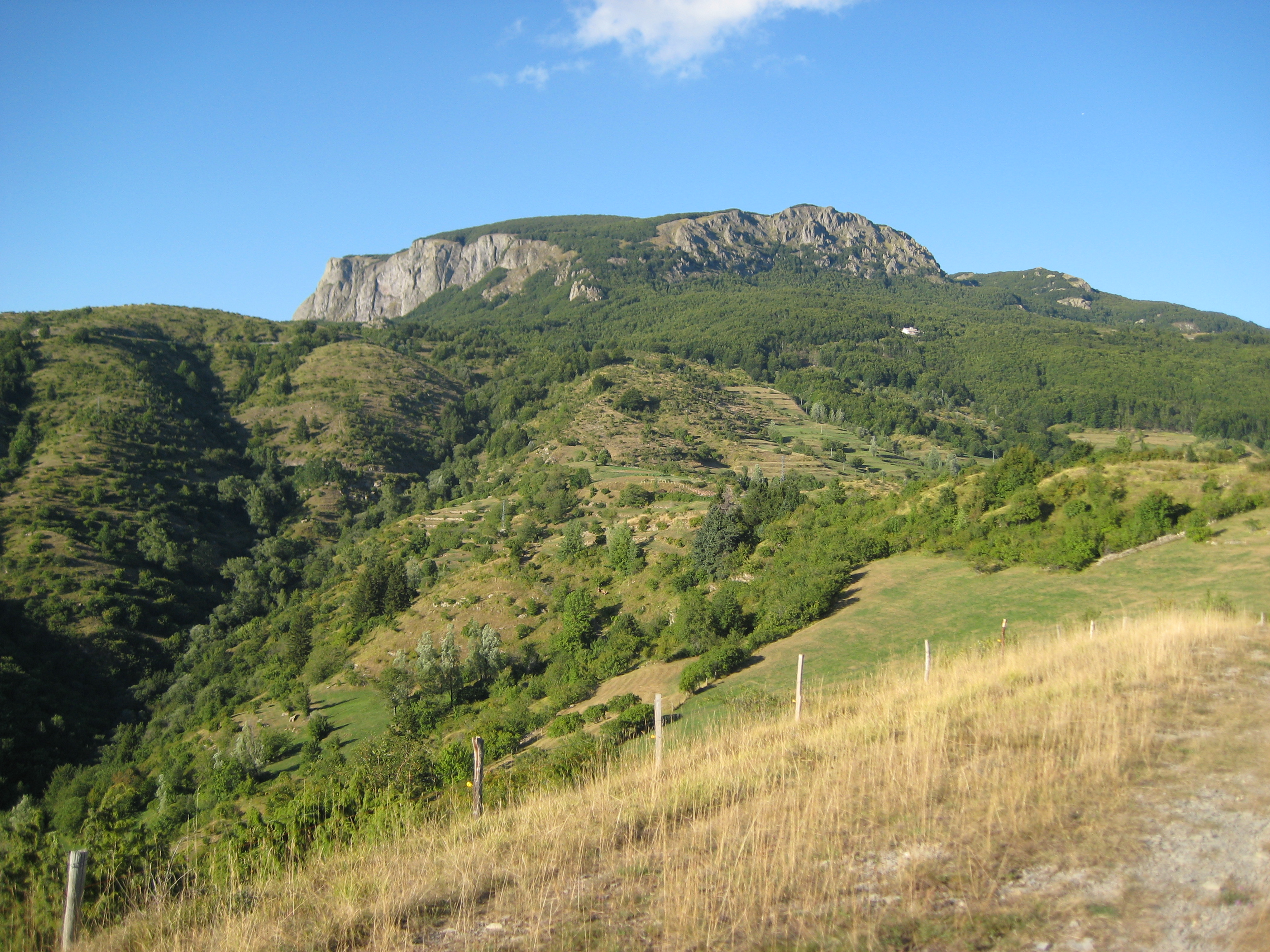 Foto: Monte Maggiorasca Autore: Franco Luigi Mazza Proprietà: Franco Luigi Mazza